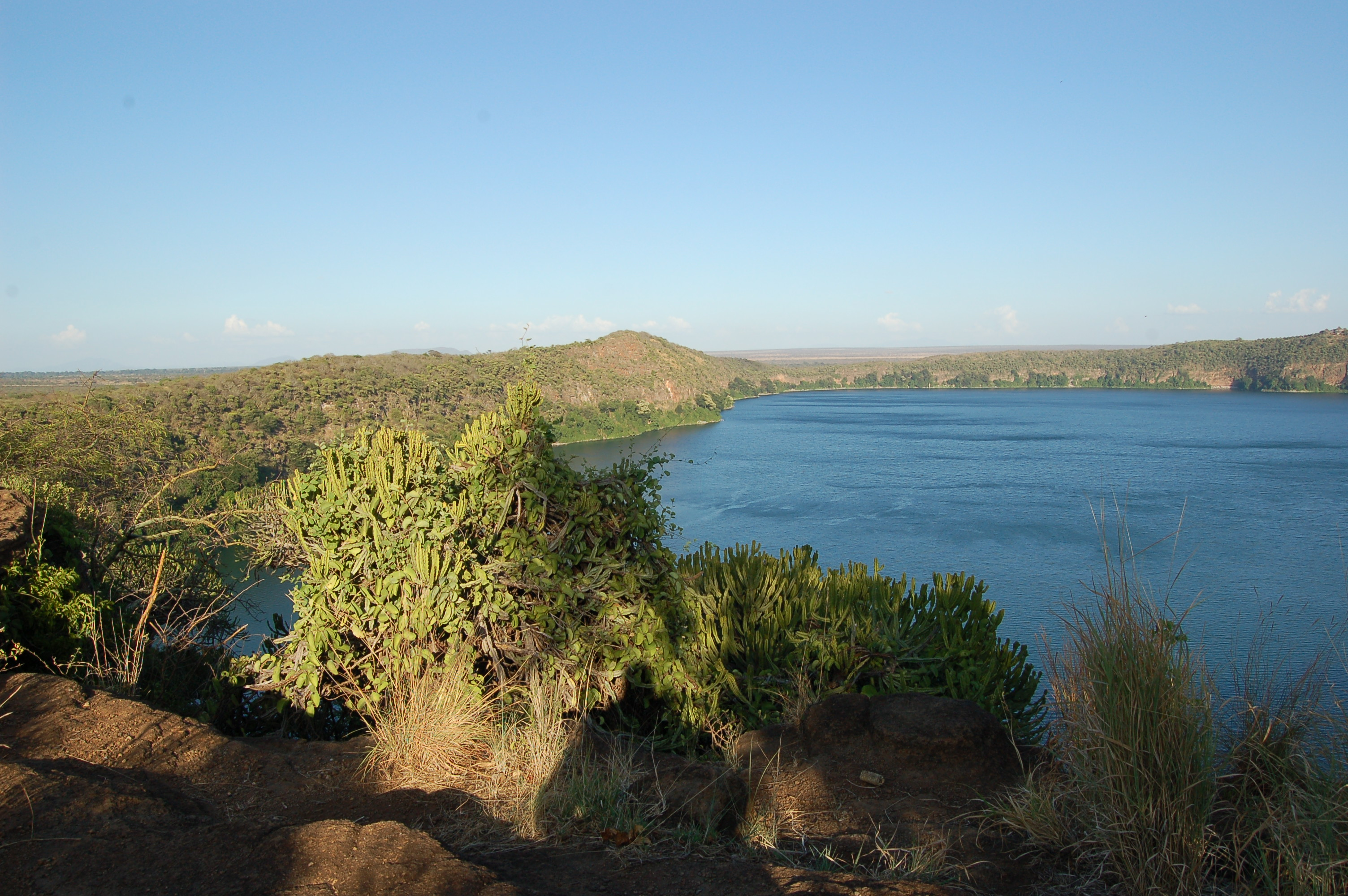 Lake Chala, Tanzania